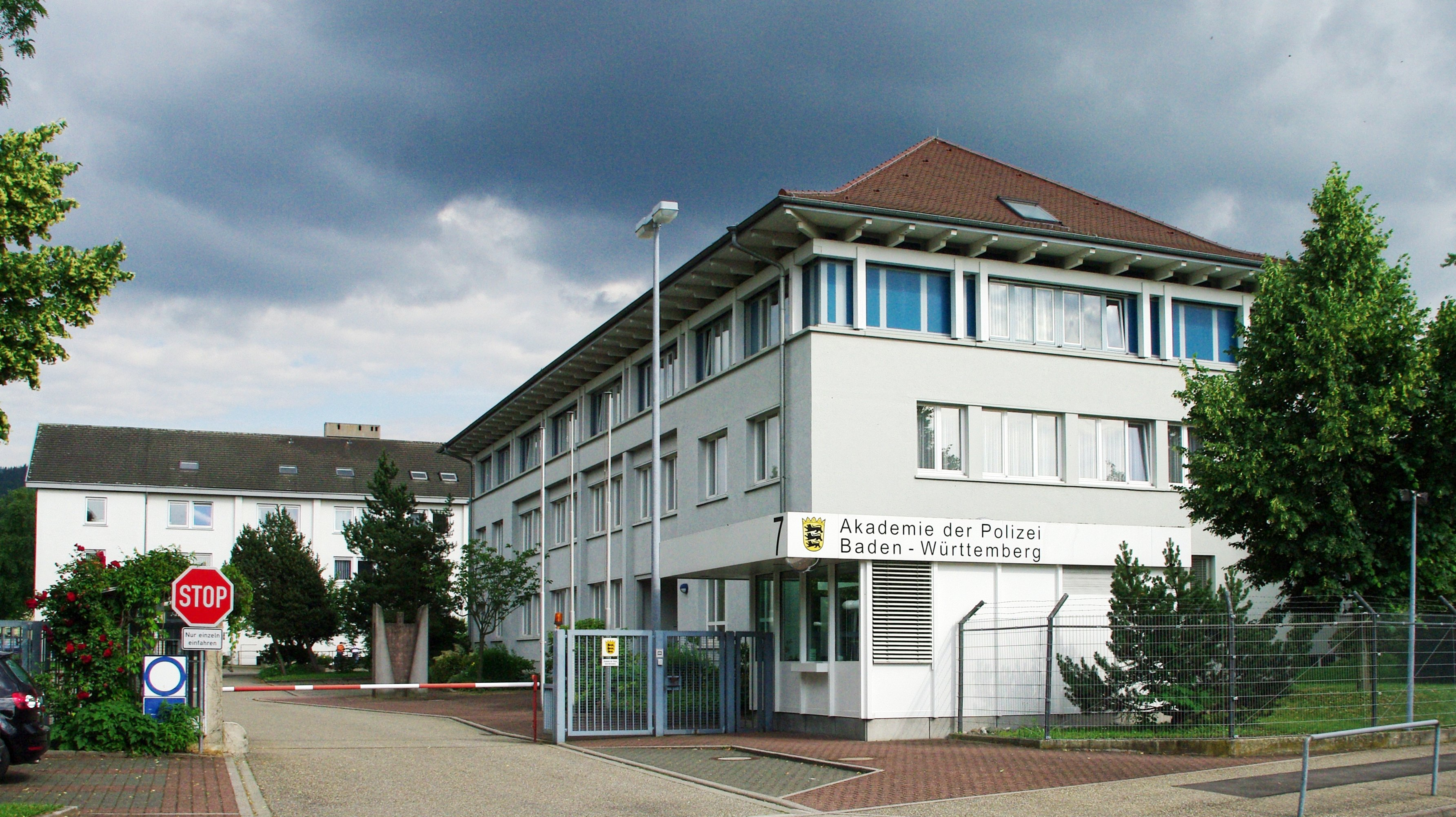 Der Eingang zur Akademie der Polizei Baden-Württemberg